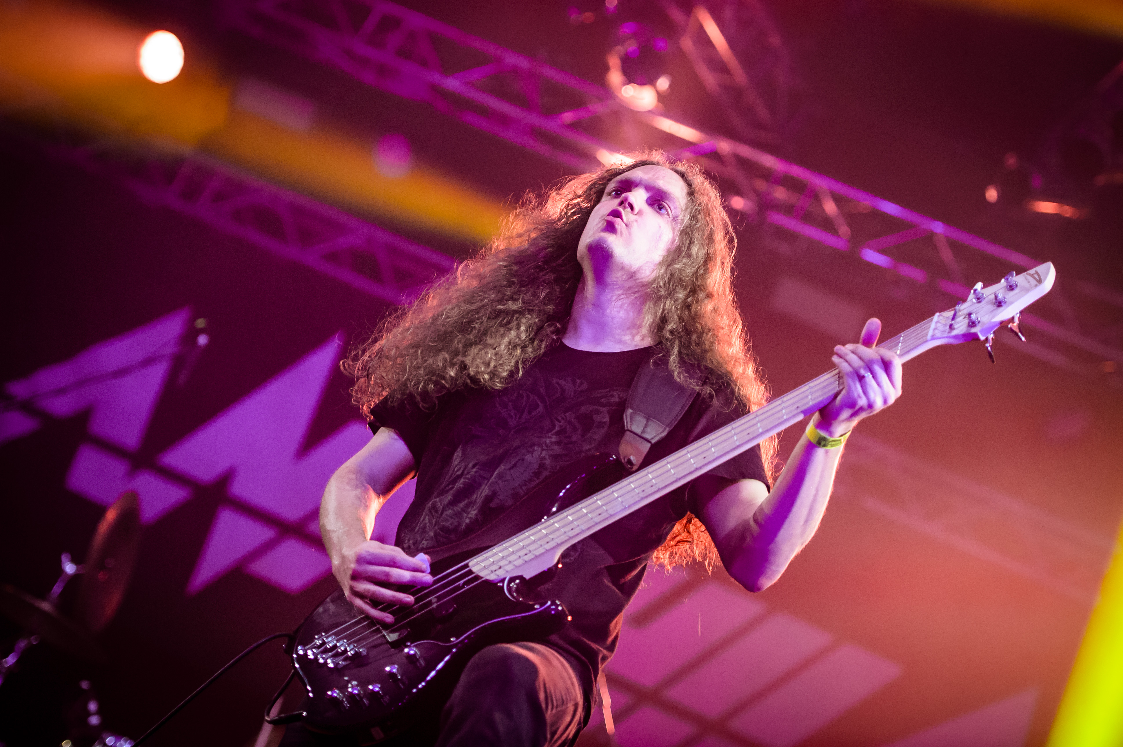 'Wacken Open Air 2017; Wacken': 'Annihilator'